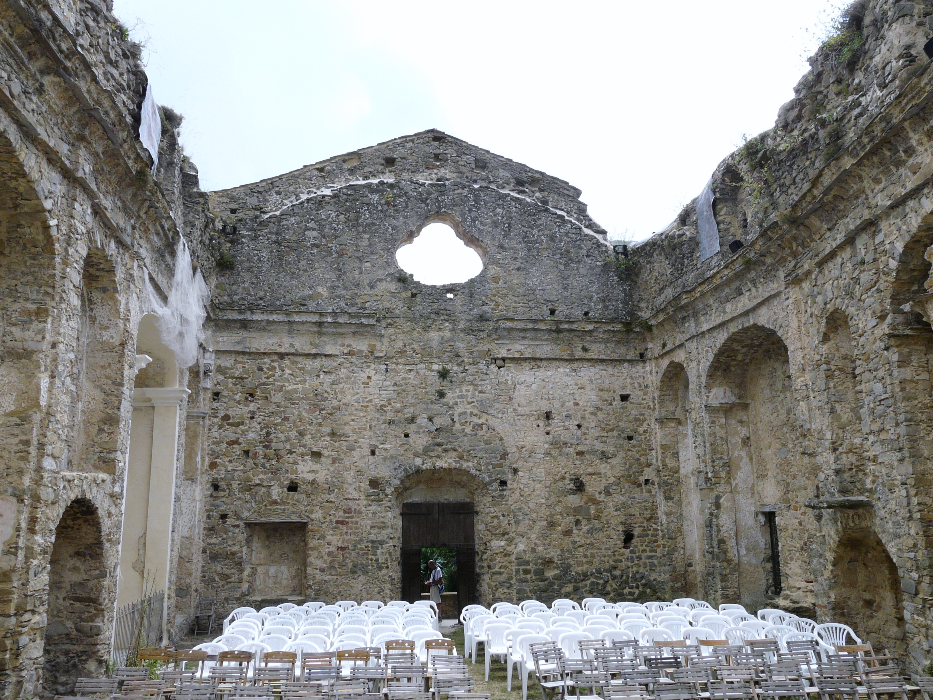 Interni dell'antica chiesa di San Nicolò, Bajardo, Liguria, Italia